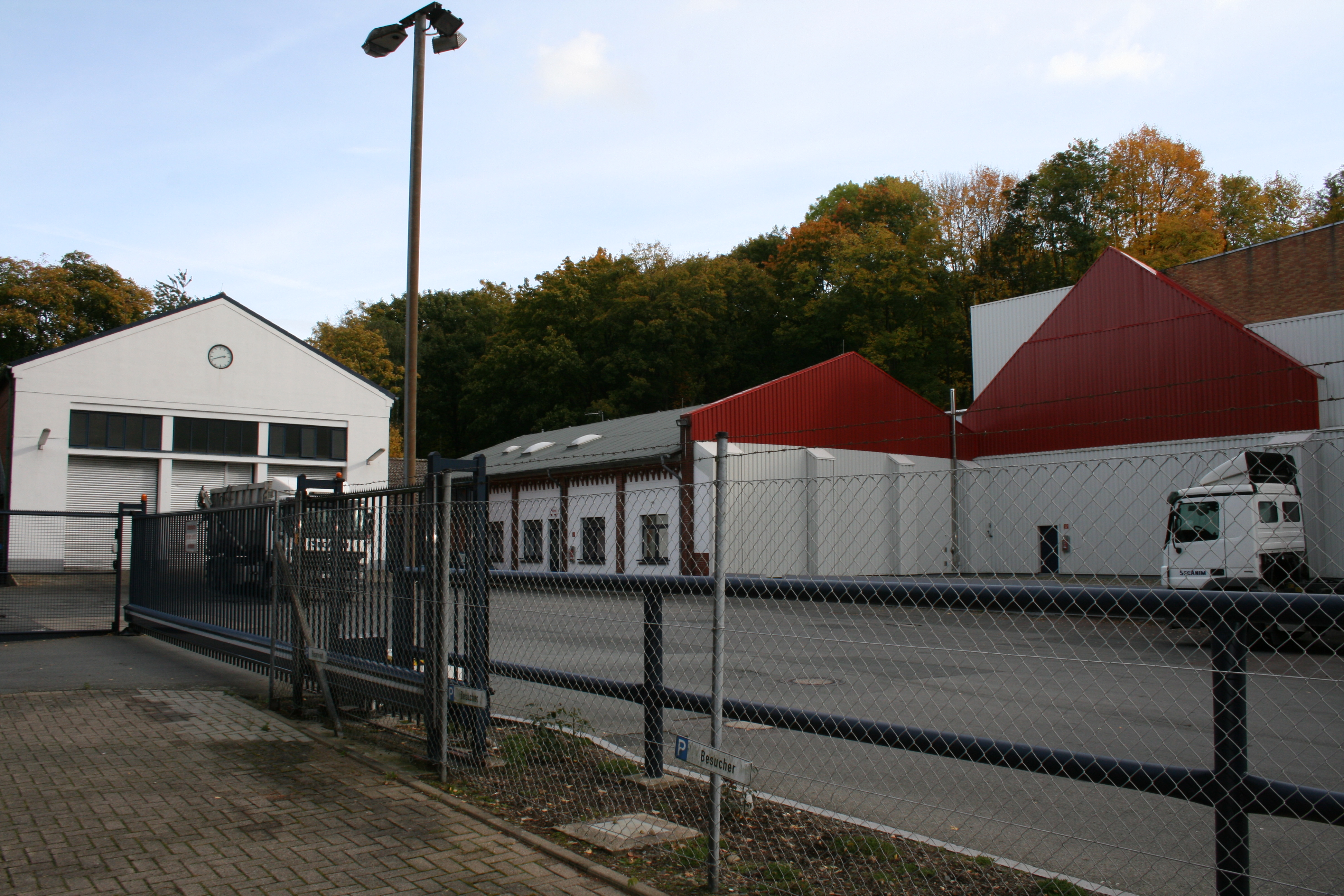 Tagesanlagen der Grube Georg-Friedrich 2012